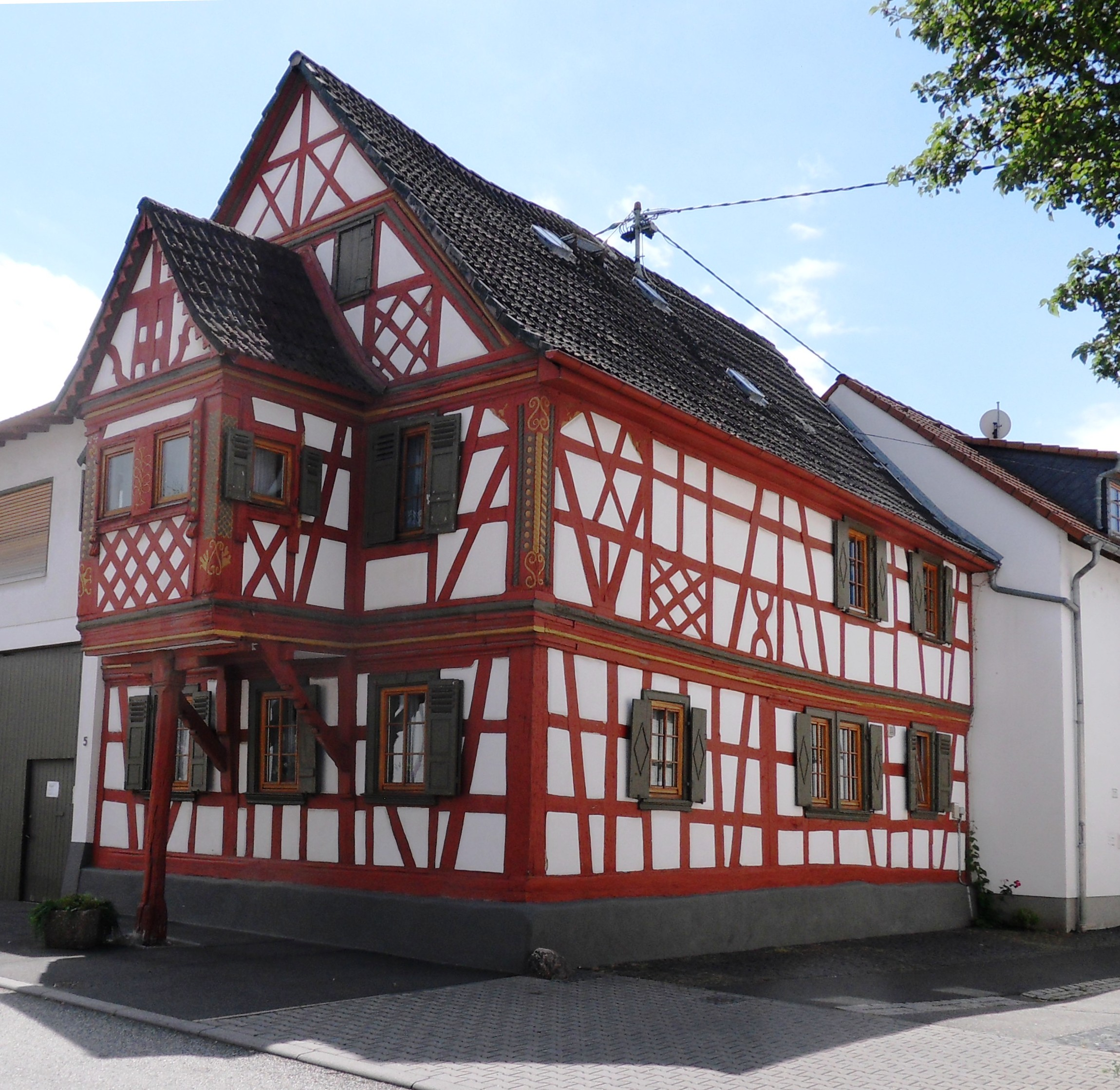 Ortsbildprägendes Fachwerkhaus mit Erker über dem Gehweg in der Landwehrstraße 5 in Delkenheim